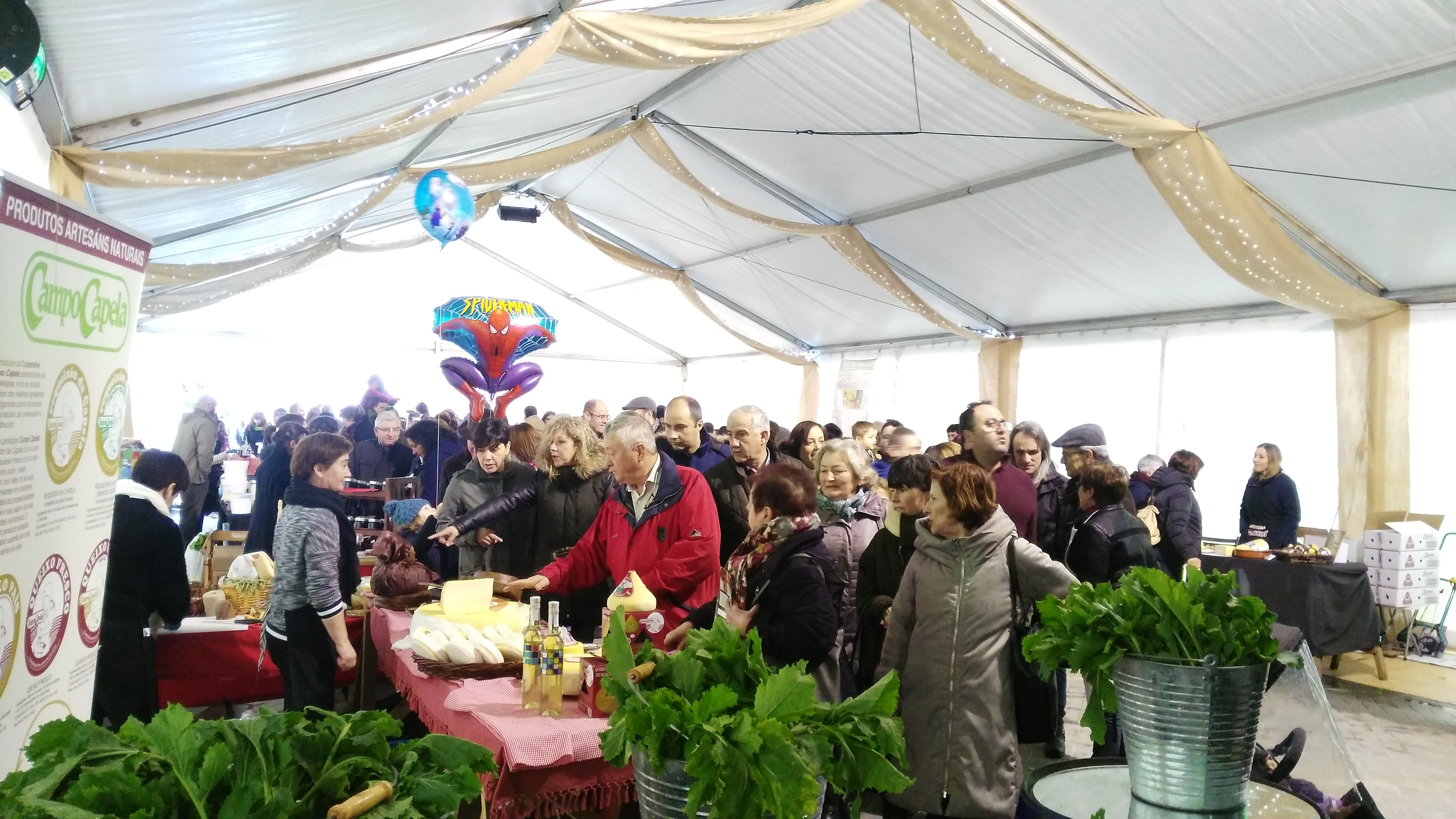 Feira do Grelo en As Pontes (2016)